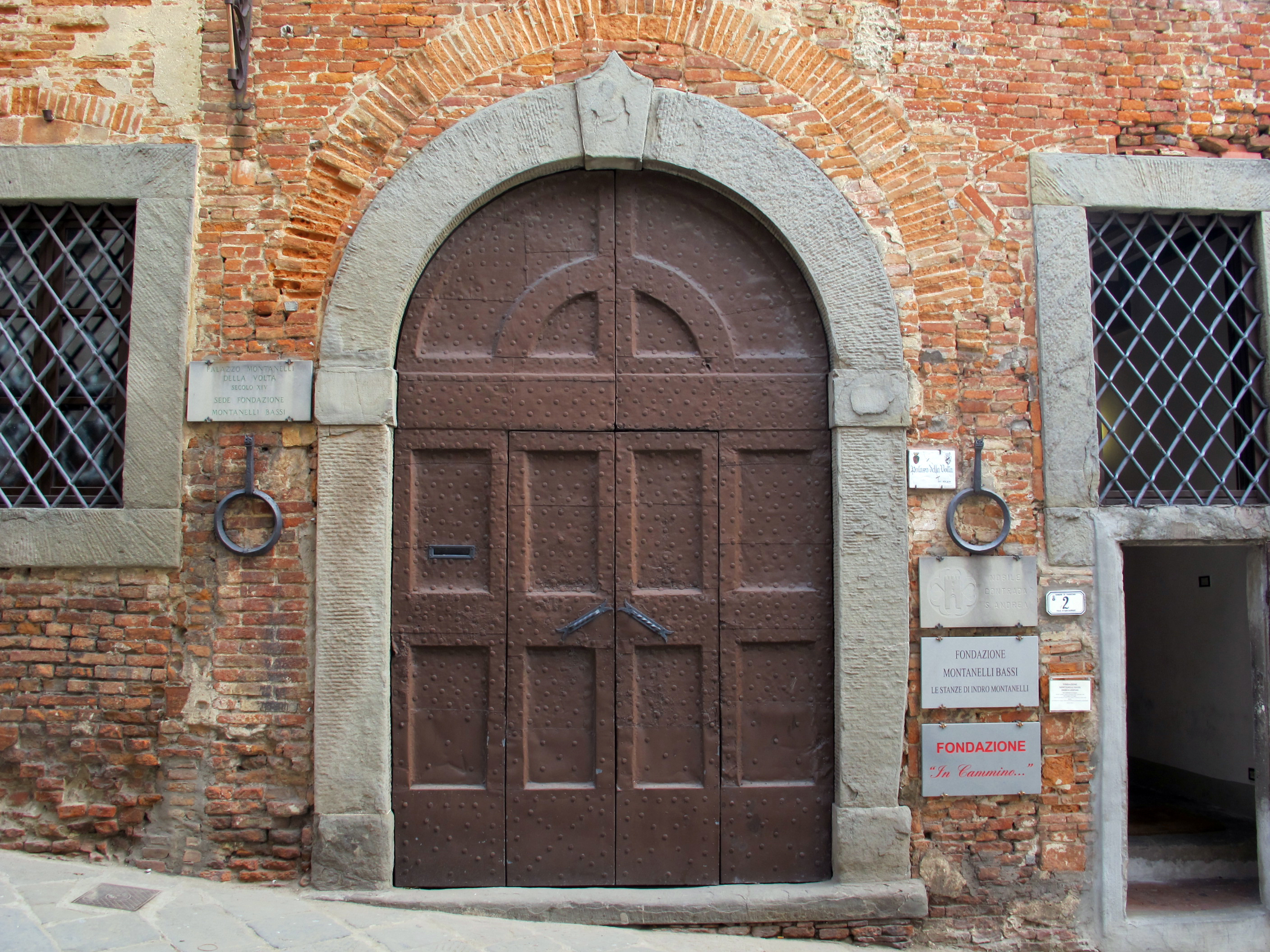 Fucecchio, palazzo montanelli della volta 03 porta